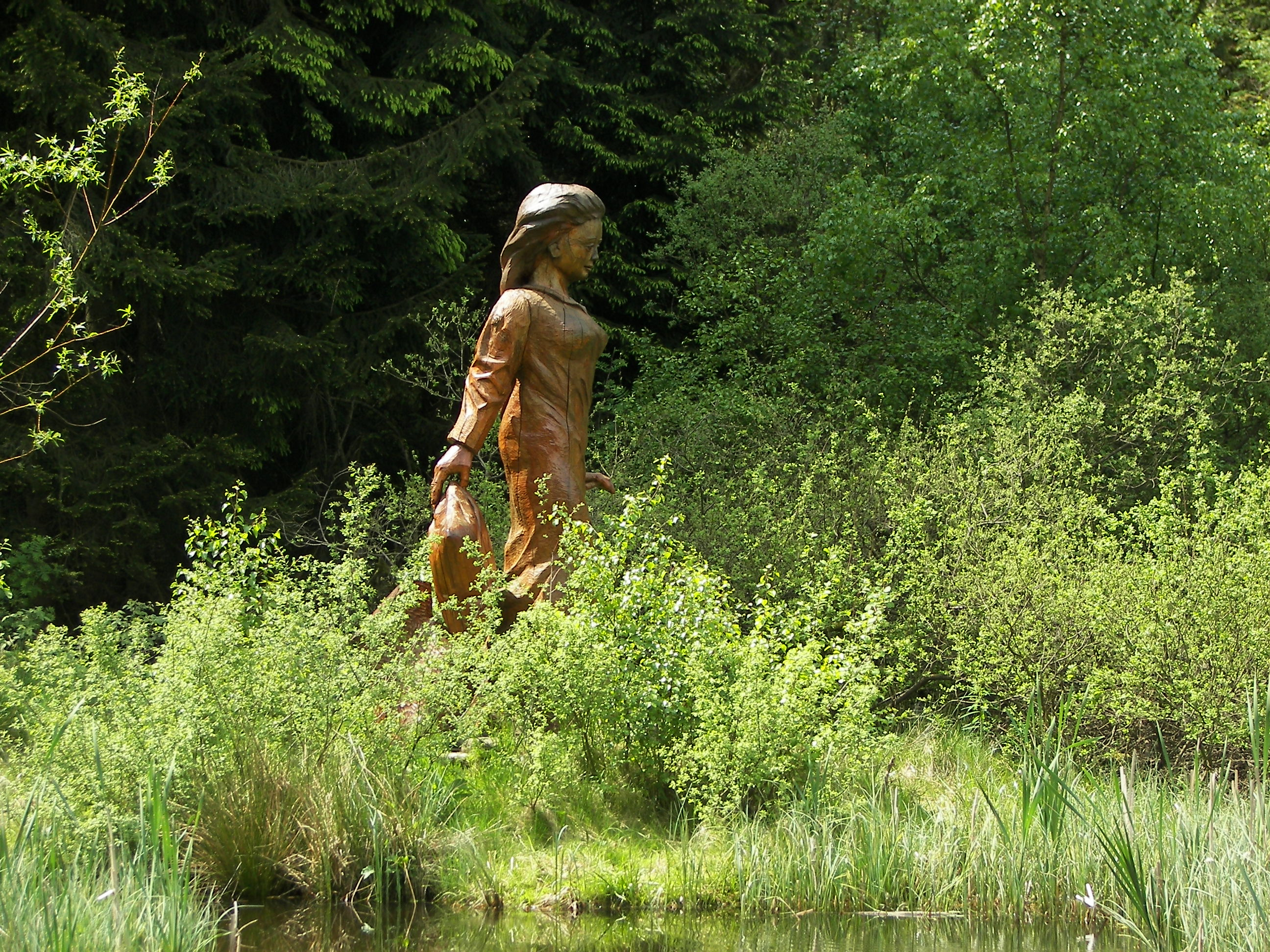 Frau Holle Teich auf dem Hohen Meißner